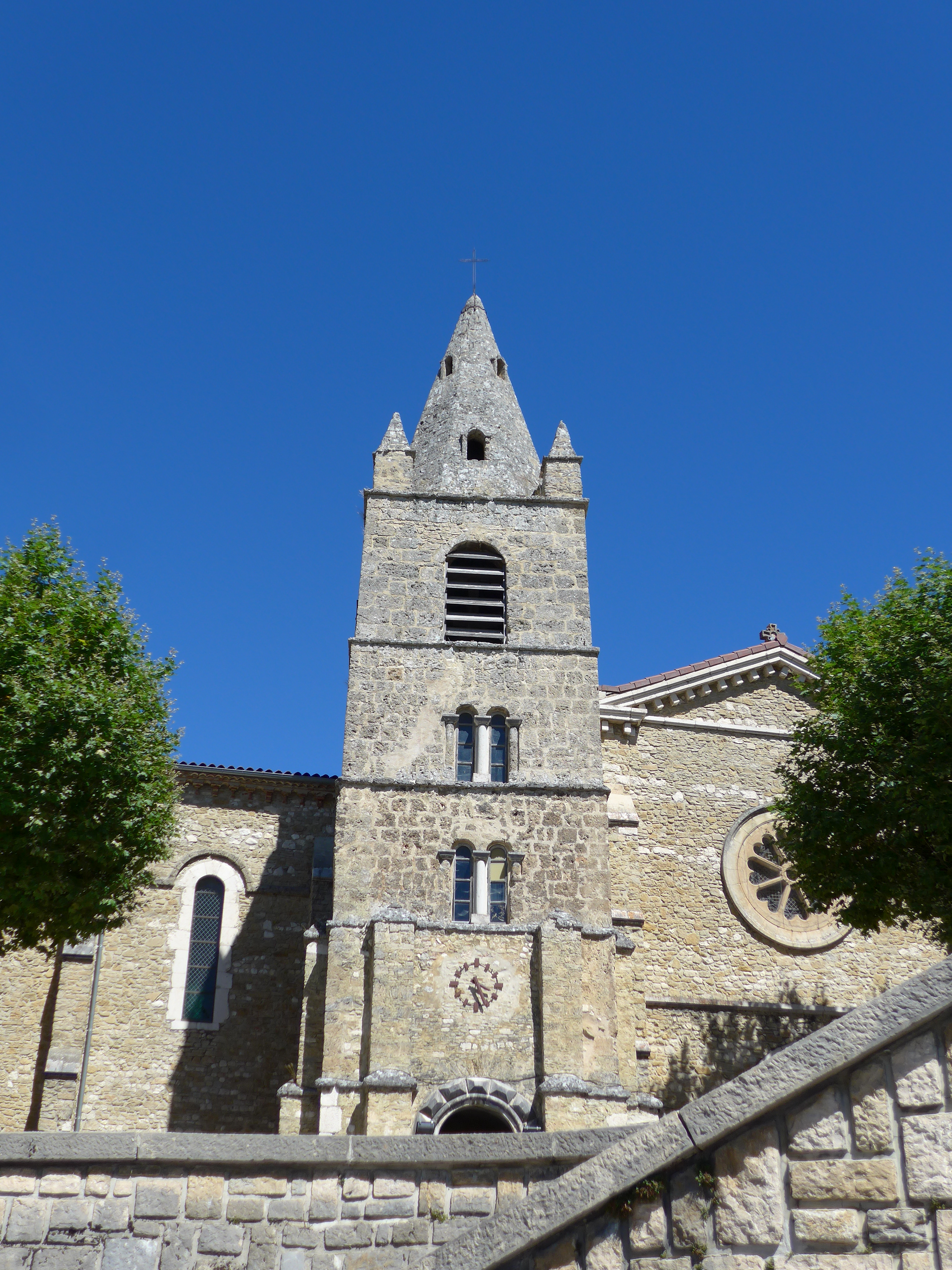 Le clocher du 13° est classé, le reste de l'église, de la ville ainsi que les autres villages du plateau du Vercors ayant été détruit par les nazis en juillet 1944. .